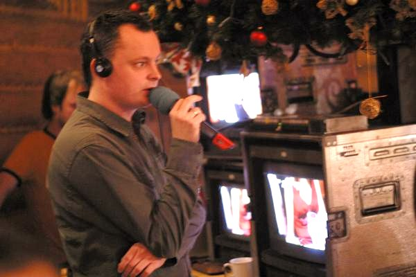 Фото Радека Кобялко за работой